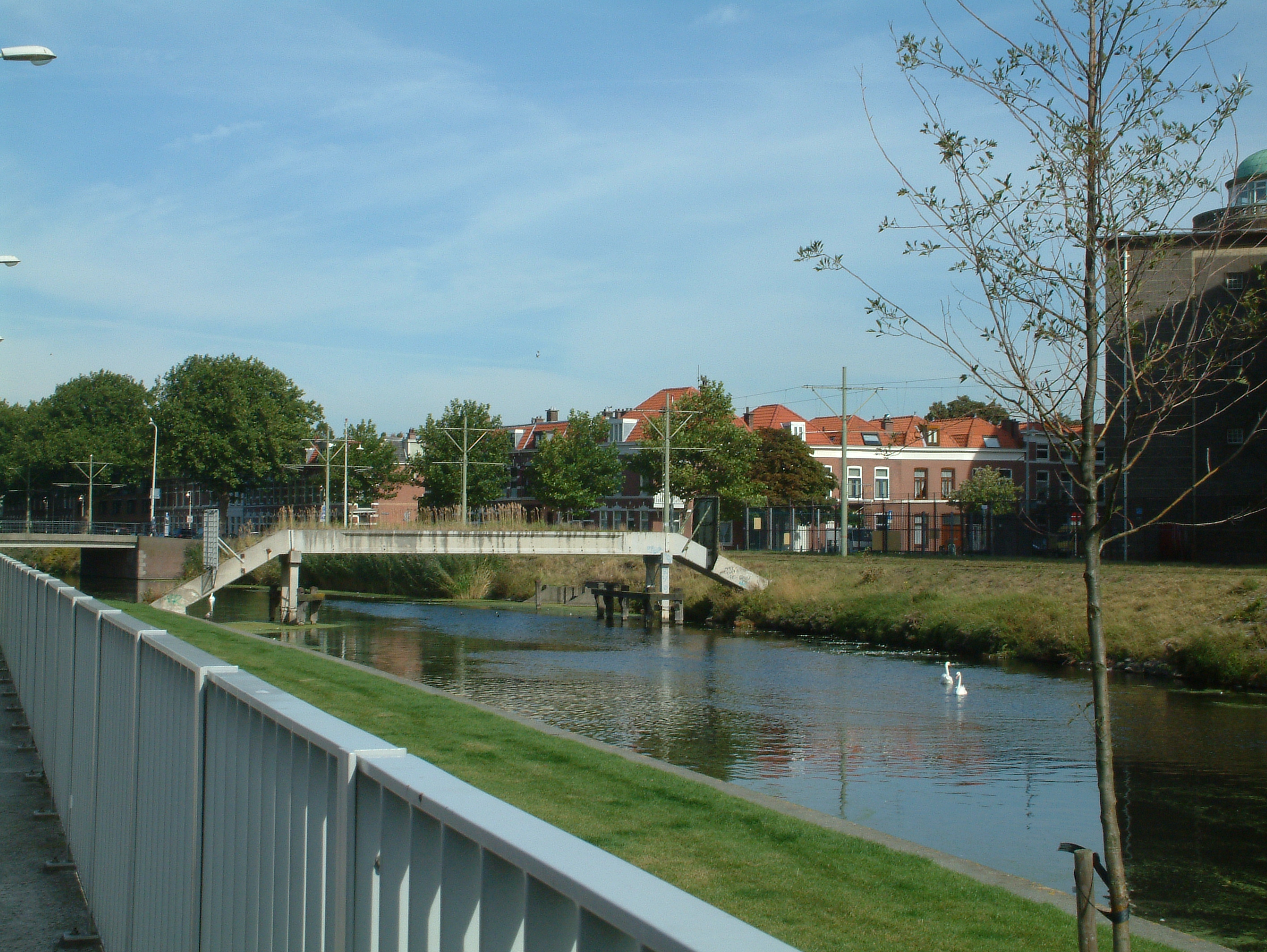 Brug in Den Haag